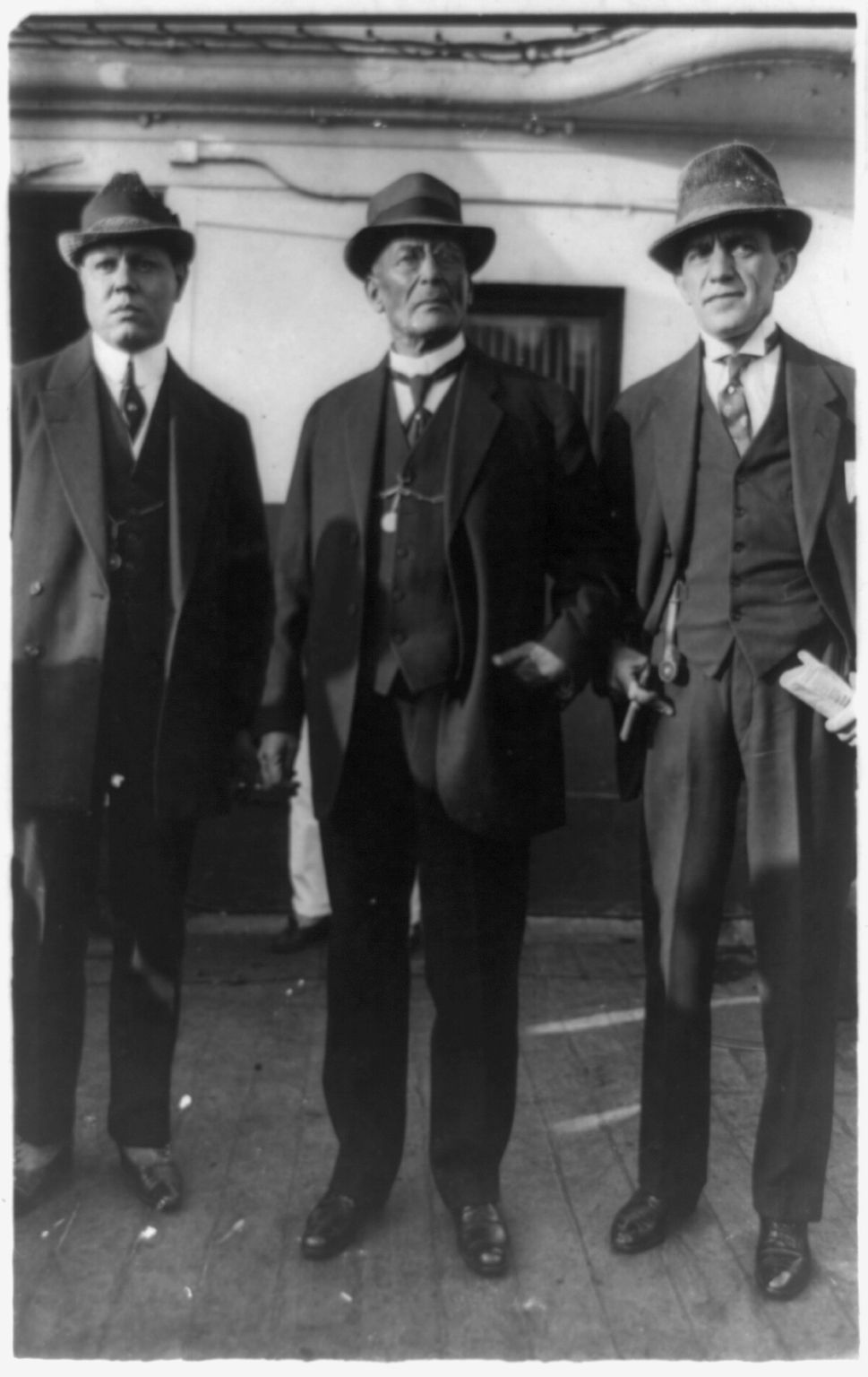 De izquierda a derecha Jose C. Delgado, Victoriano Huerta, Abraham F. Ratner